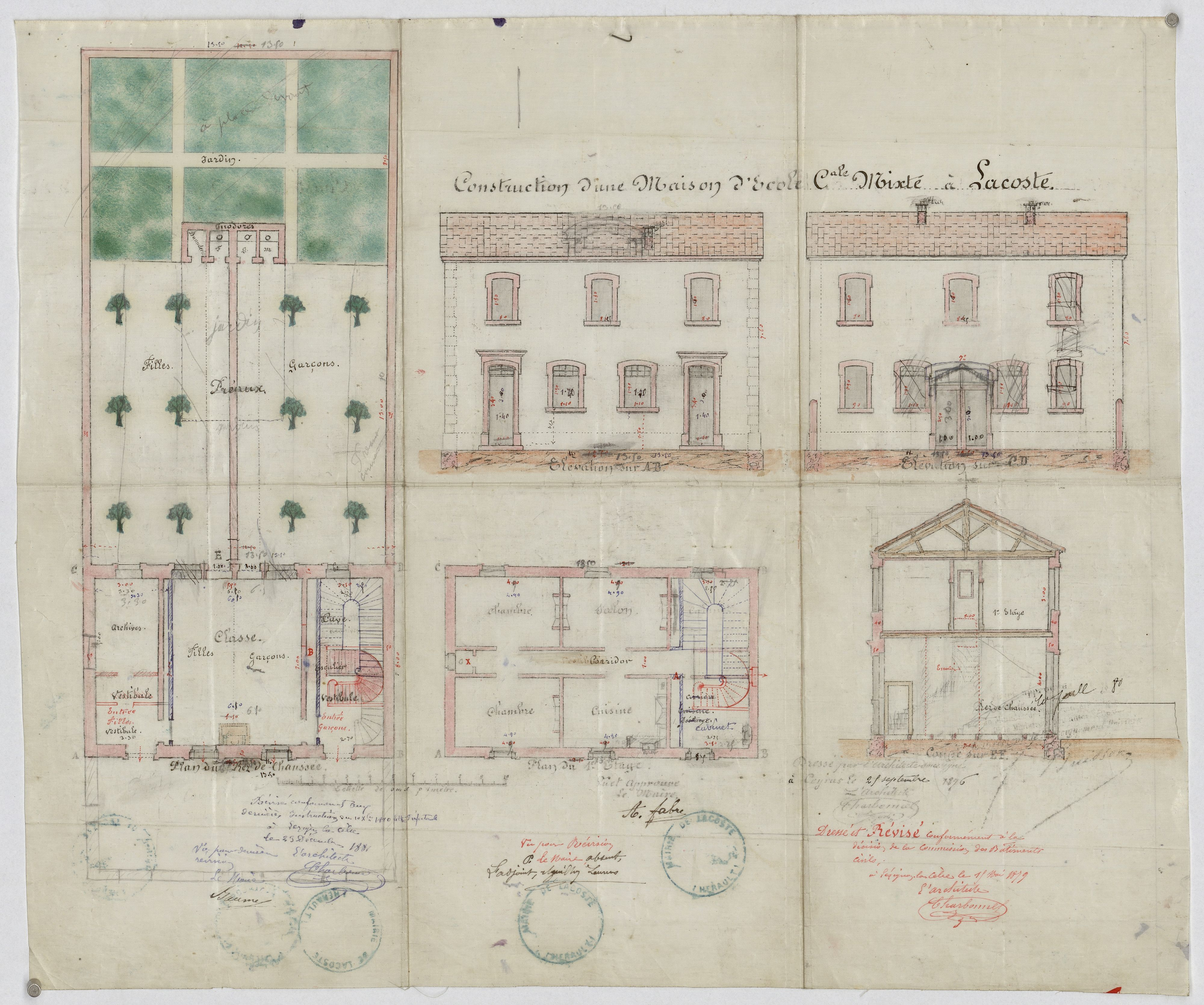 Lacoste. - Construction d'une maison communale mixte : plan